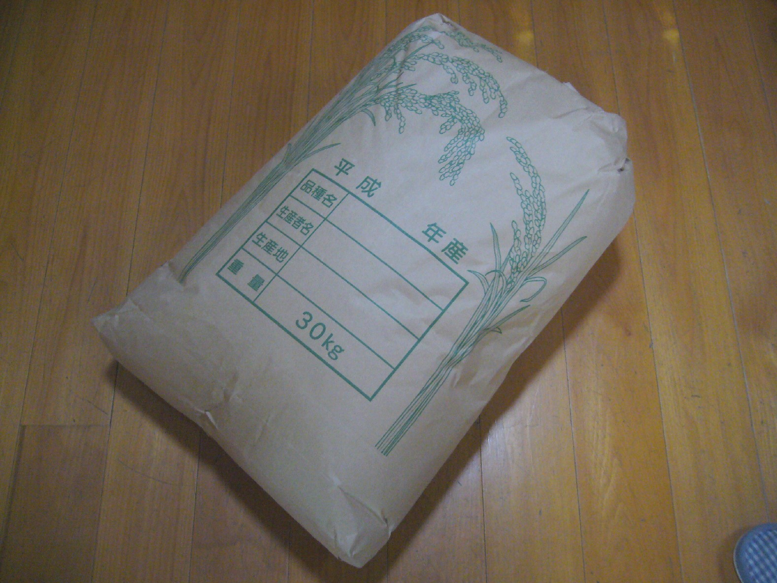 rice-paper-bag,katori-city,japan